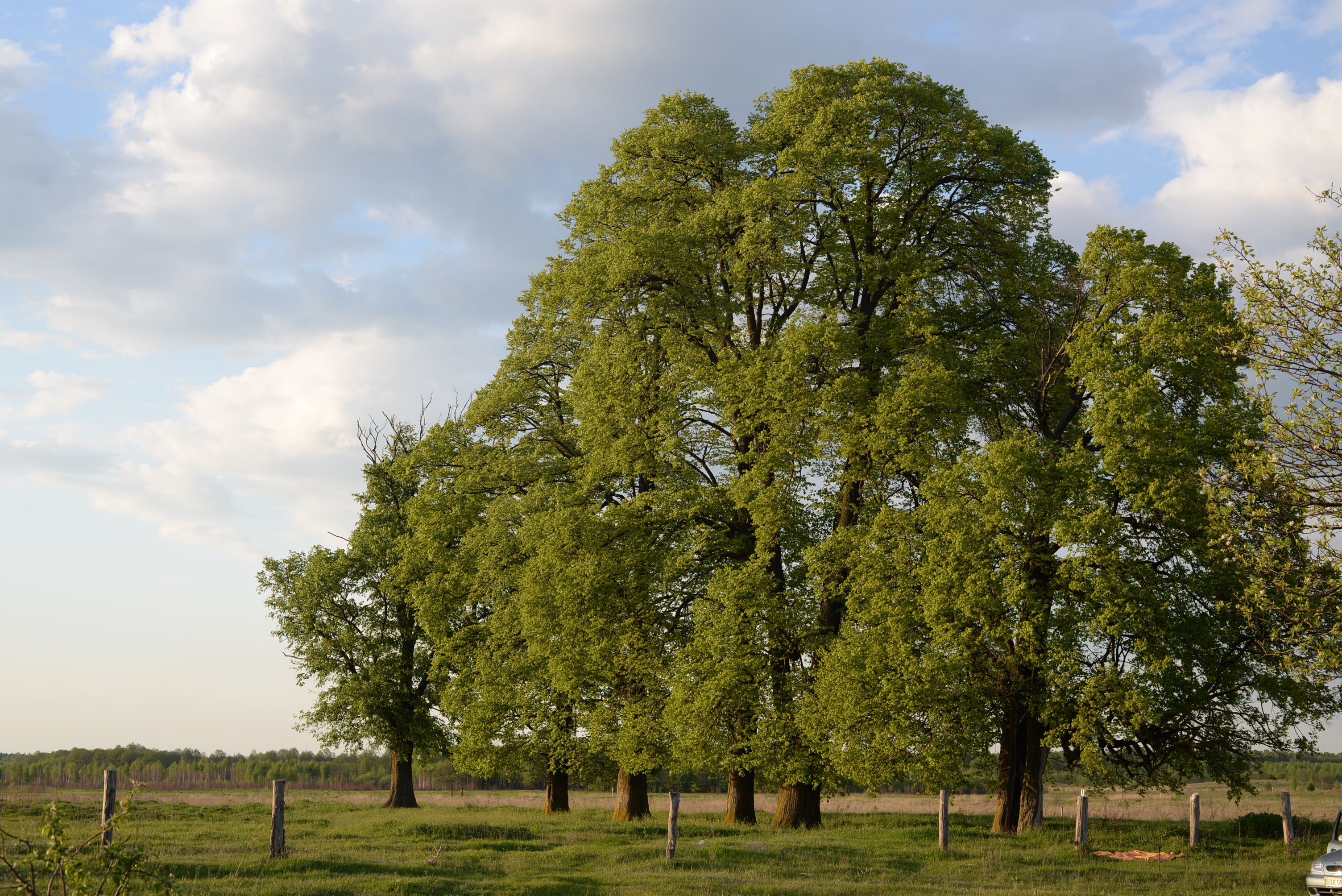 3 липи